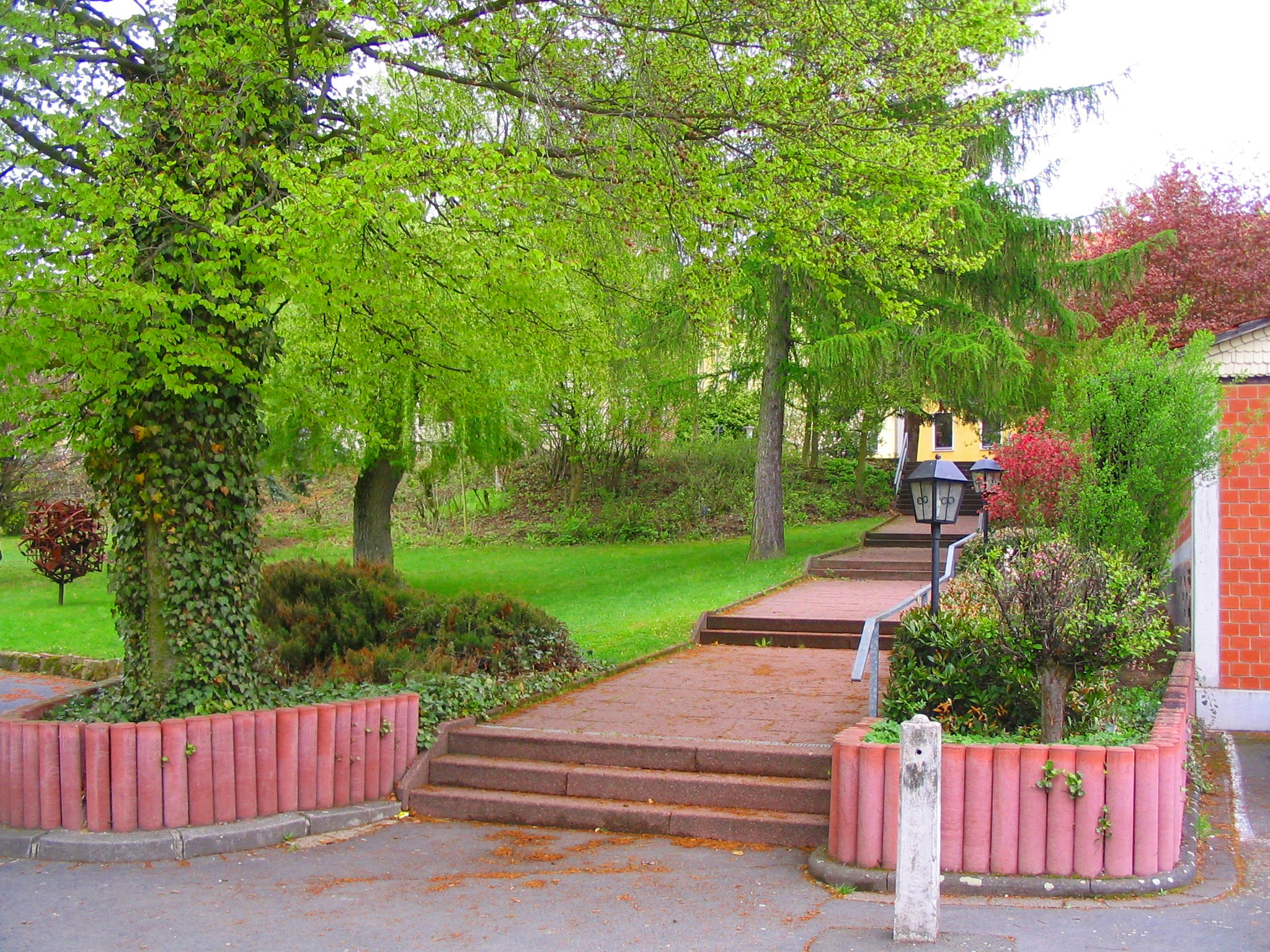 Eingangstreppe bei Stiftung Beiserhaus in Knüllwald-Rengshausen.